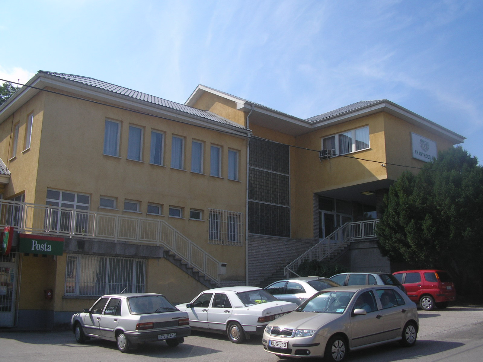 A volt Aranykalász tsz. központi épülete a falu közepén (Kocs)